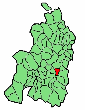 aipaturiko udalerriaren kokapena Nafarroa Beherean